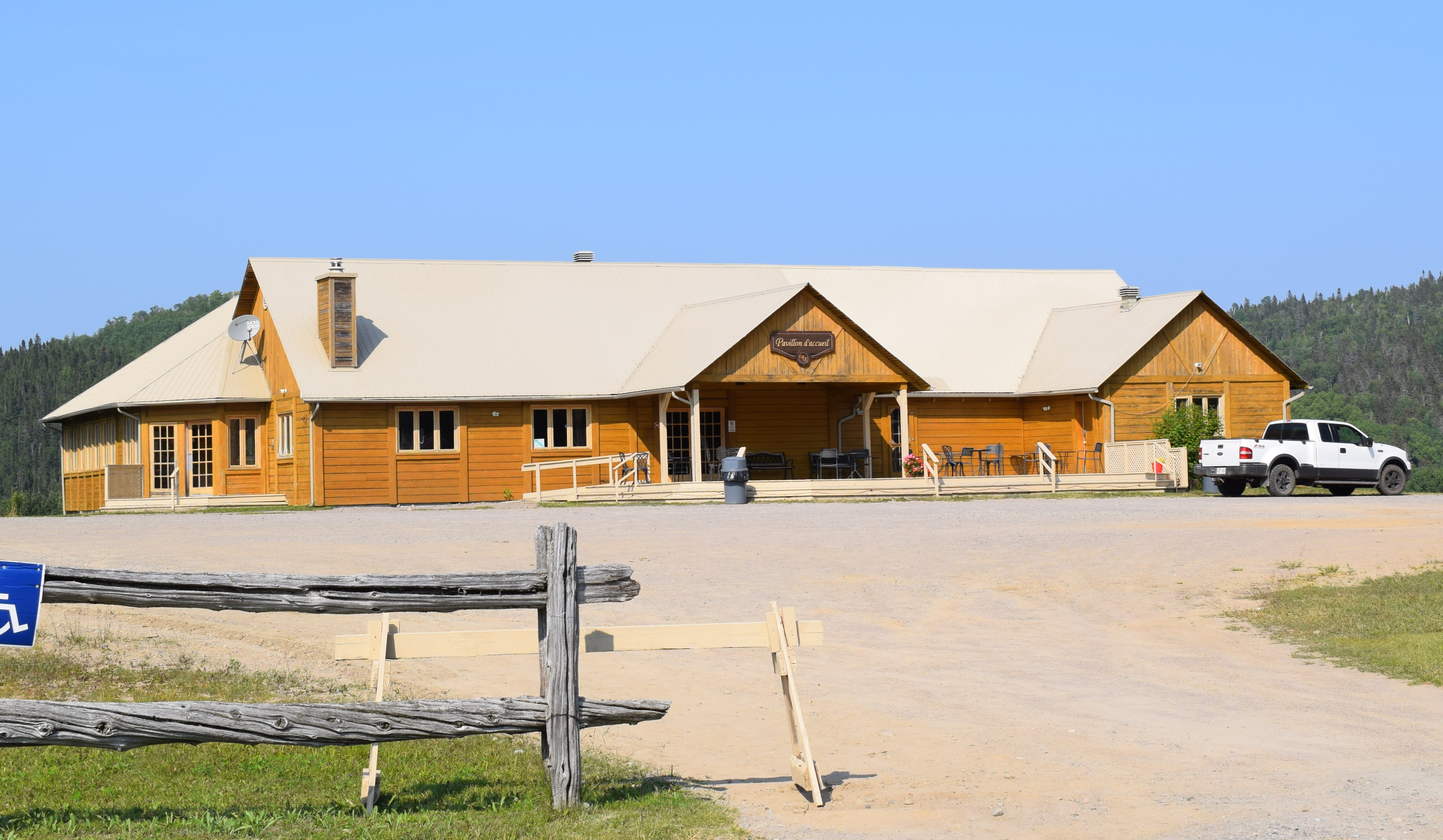 Accueil du Site de la Nouvelle-France, sis au 370 Vieux-Chemin, Saint-Félix-d'Otis au Québec